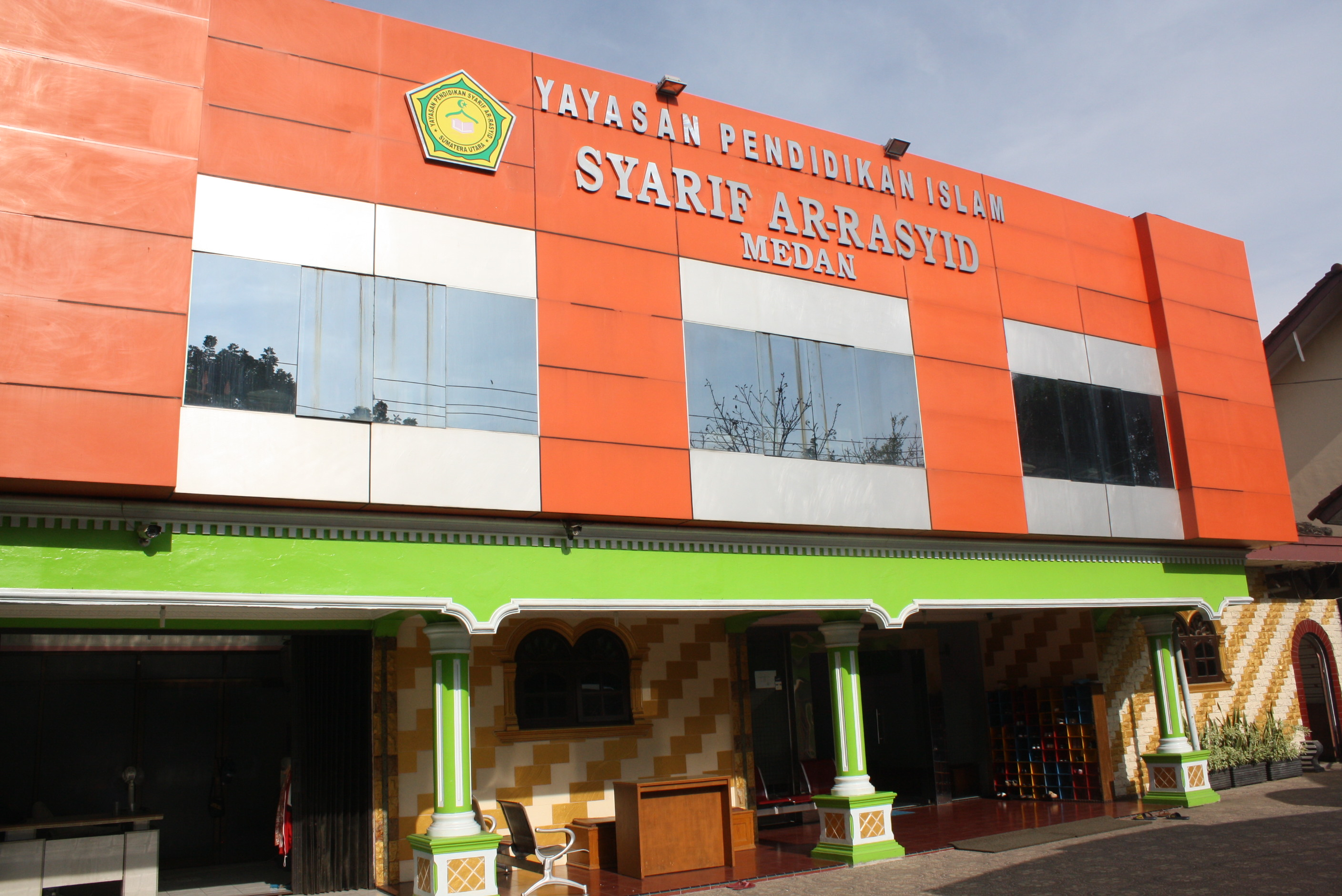 tk-syarif-ar-rasyid